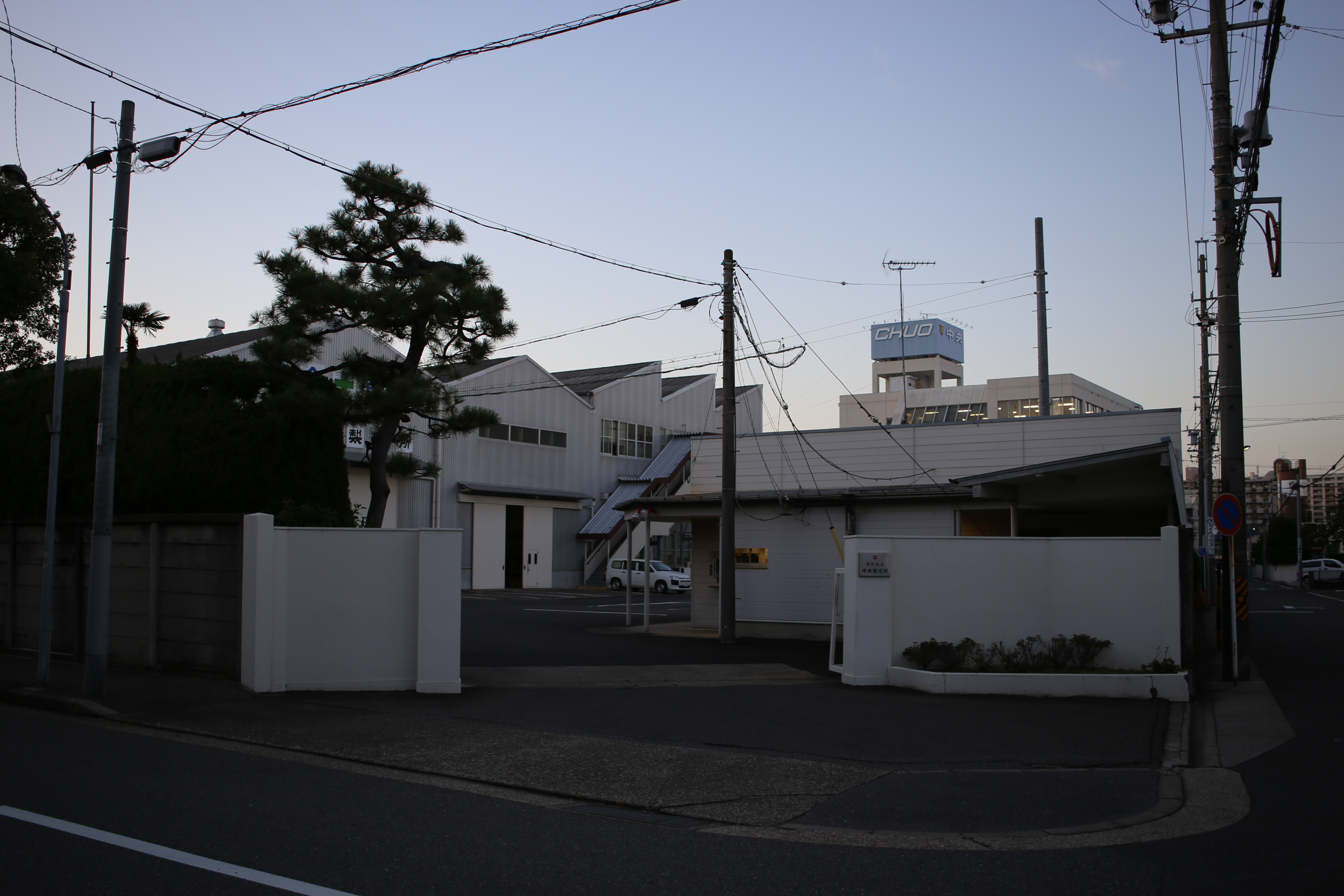 名古屋市瑞穂区内浜町の中央製作所本社を東側公道南側より撮影